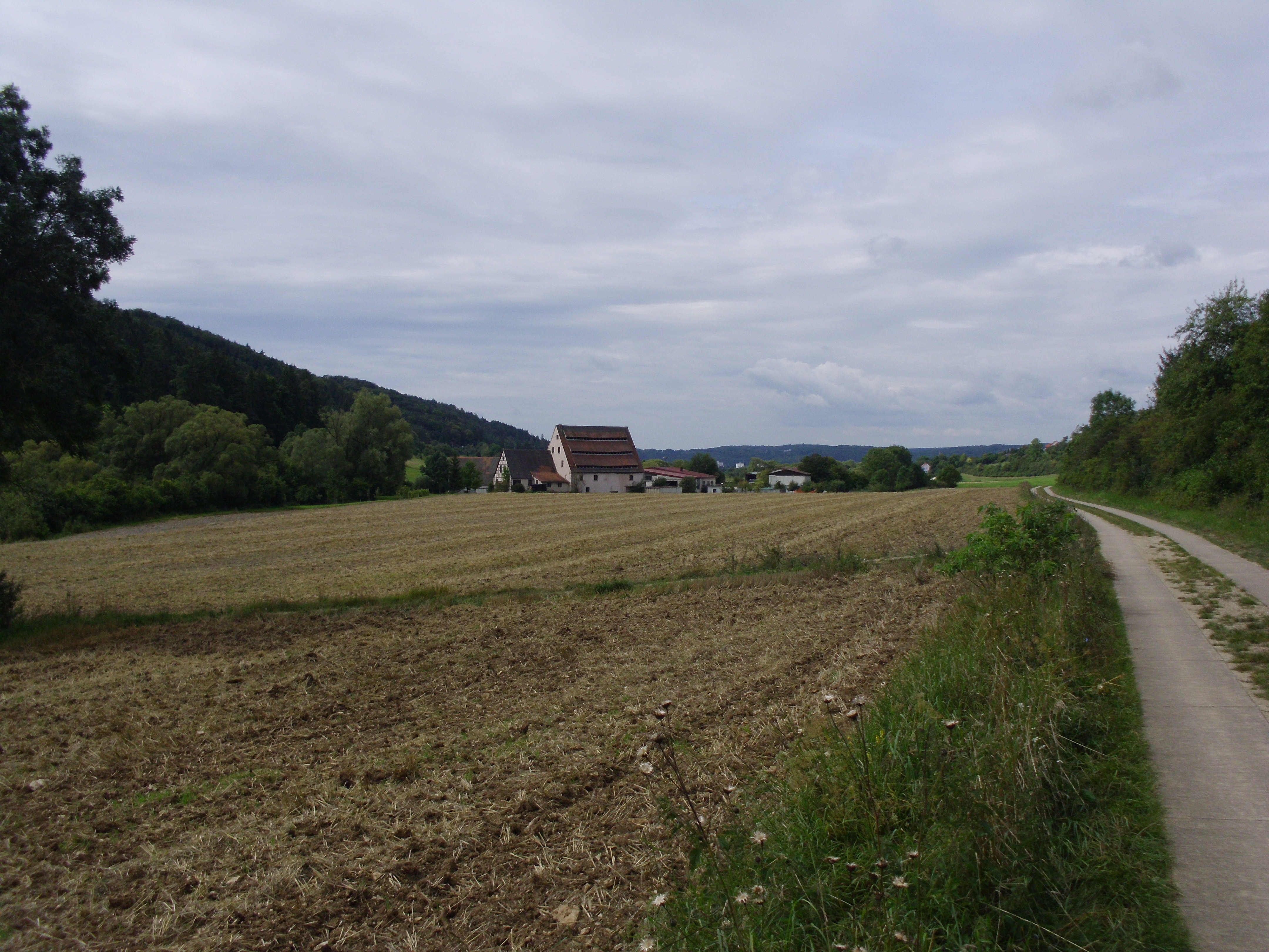 Obere Papiermühle, Ortsteil von Treuchtlingen im Landkreis Weißenburg-Gunzenhausen